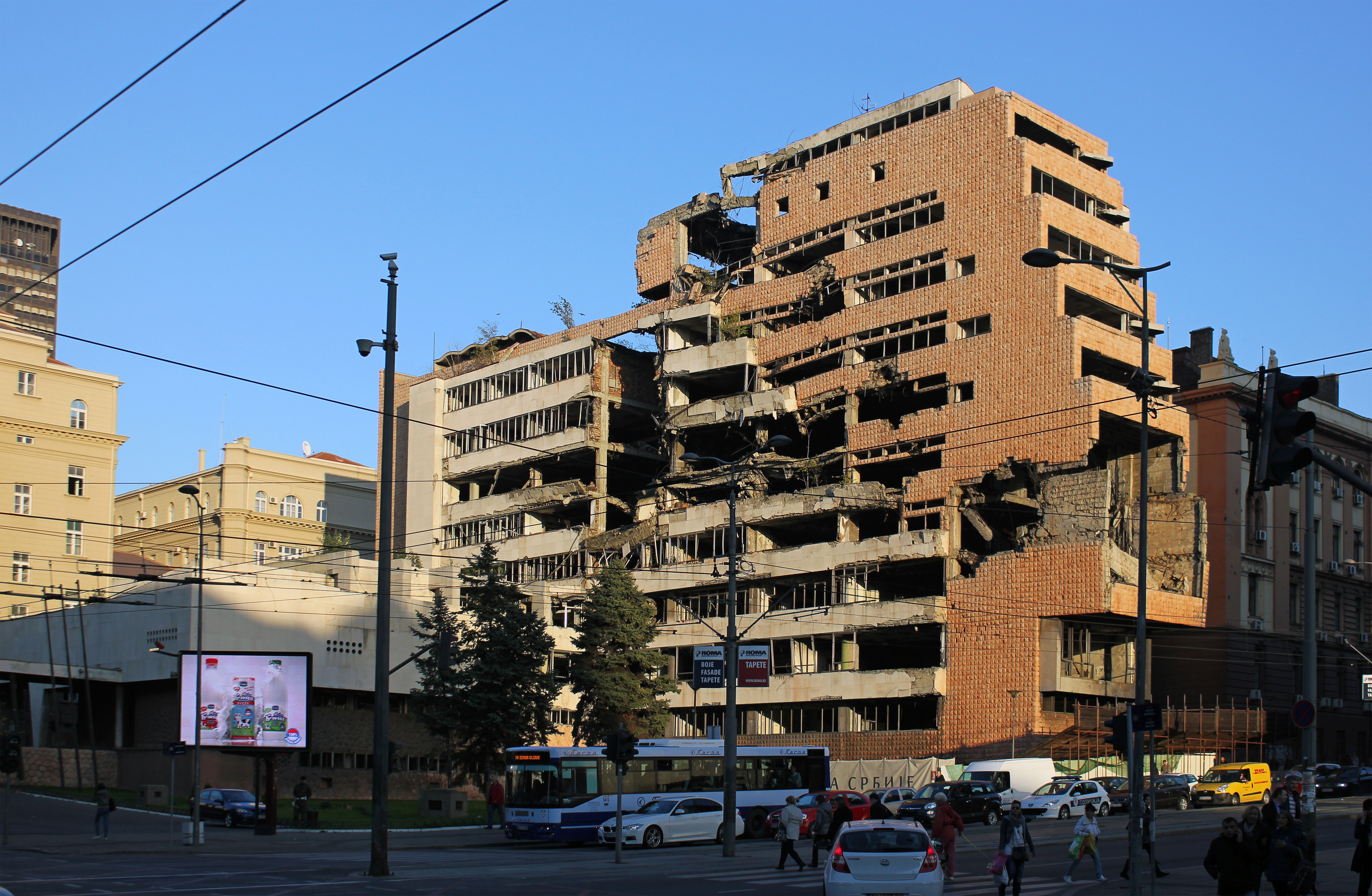 Белград. Разрушенное в ходе бомбардировок НАТО в 1999 г. здание министерства обороны Югославии